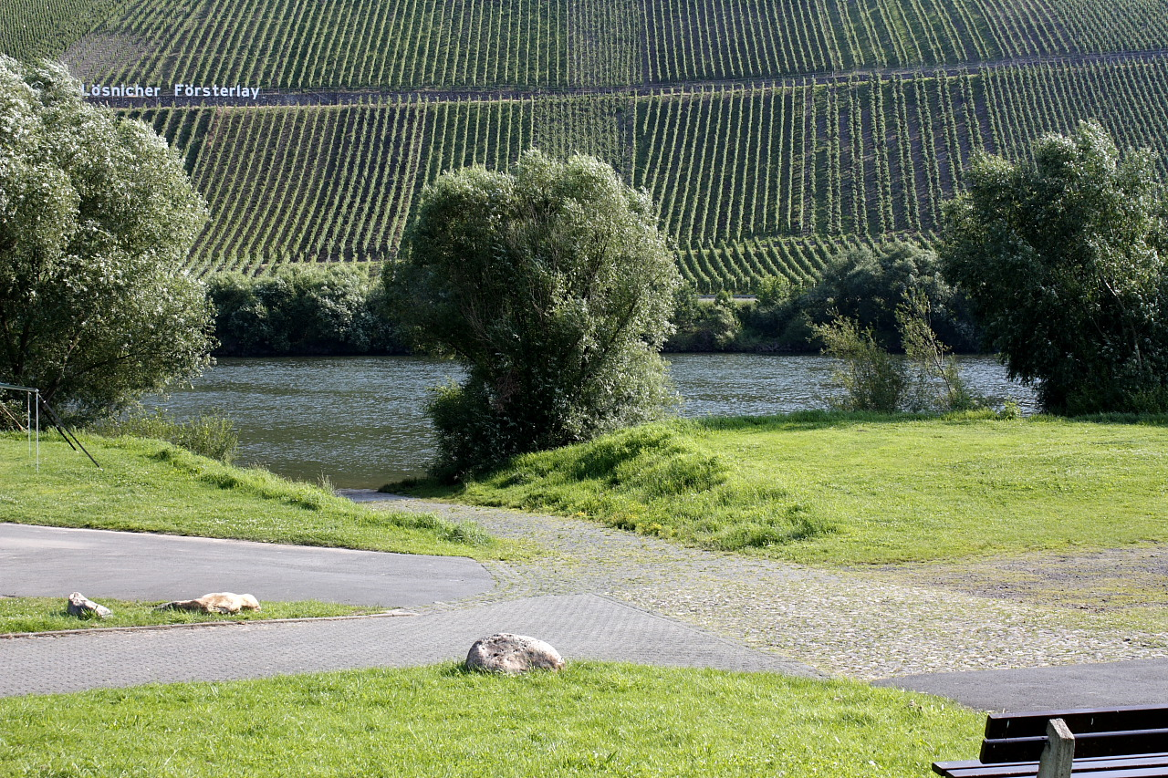 Der noch vorhandene Fährkopf der alten Lösnicher Gierseilfähre über die Mosel 2013.